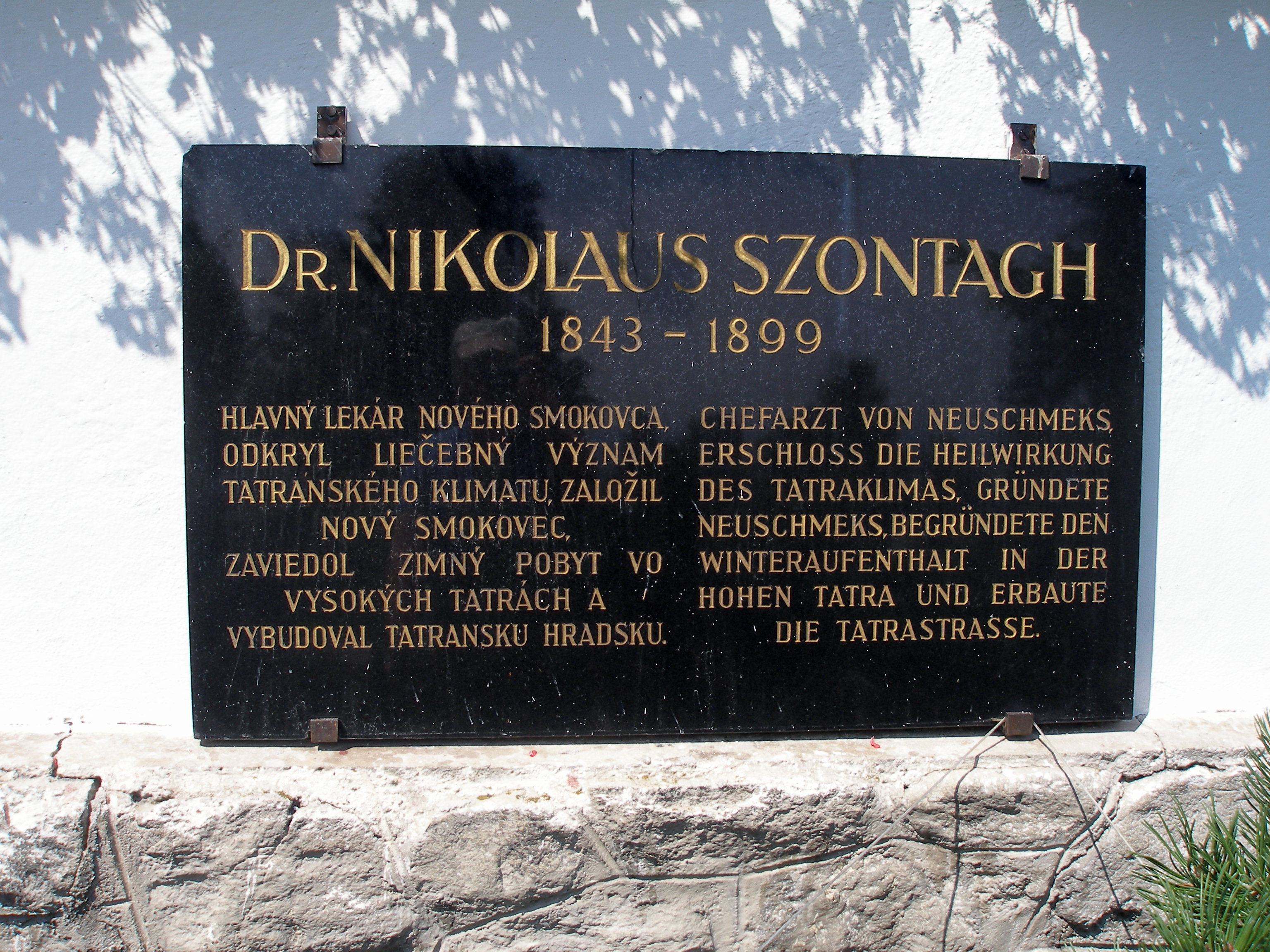 Tatranská osada Nový Smokovec, mesto Vysoké Tatry.